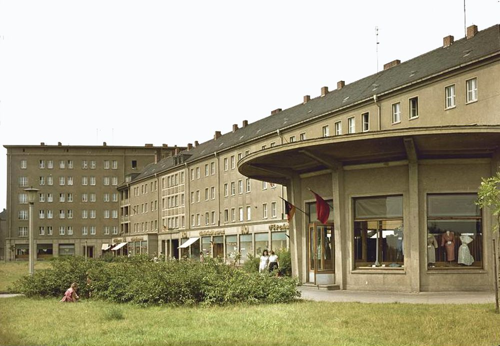 Leipzig, HO-Kaufhaus Leipzig Hermann-Duncker-Straße H.O.-Kaufhaus [Leipzig.- HO-Kaufhaus in der Hermann-Duncker-Straße]